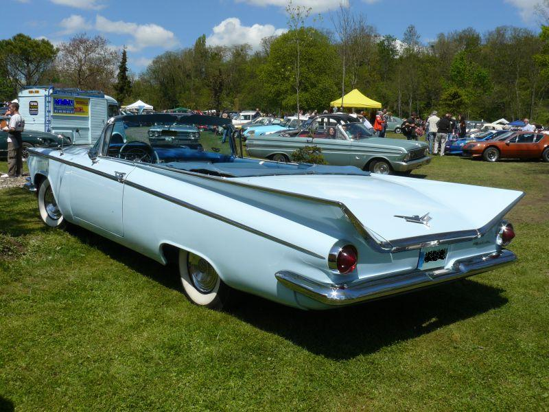 Photo prise à Chelles le 1er Mai 2012